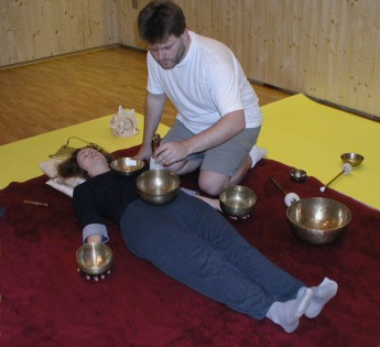 Klagmassage